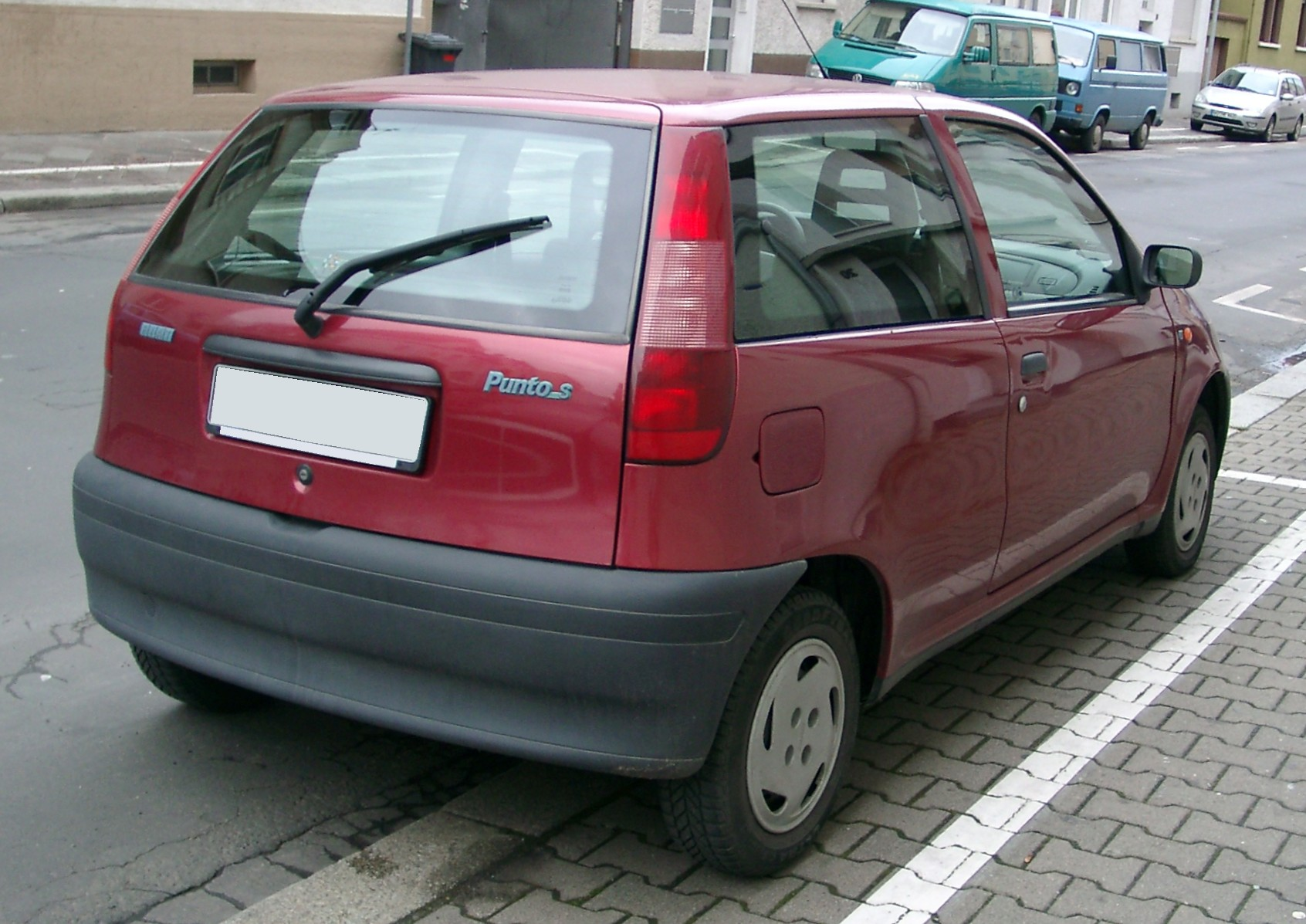 Fiat Punto, 1. Generation